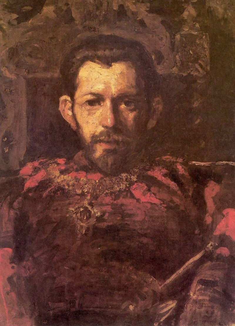 Портрет Сергея Саввича Мамонтова в театральном костюме. 1890. Государственный Русский музей, Санкт-Петербург. 38 × 51 см. Масло, холст.